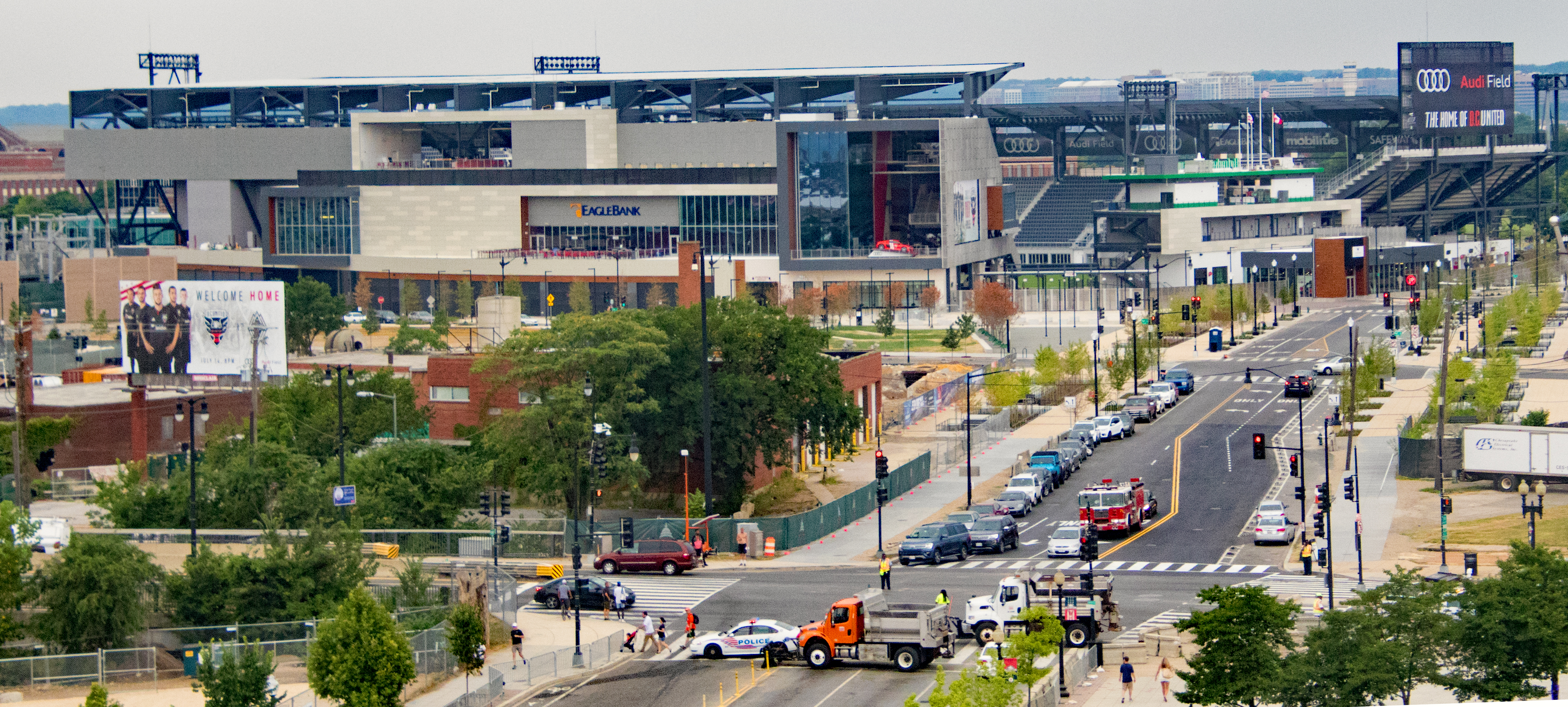 125A1706